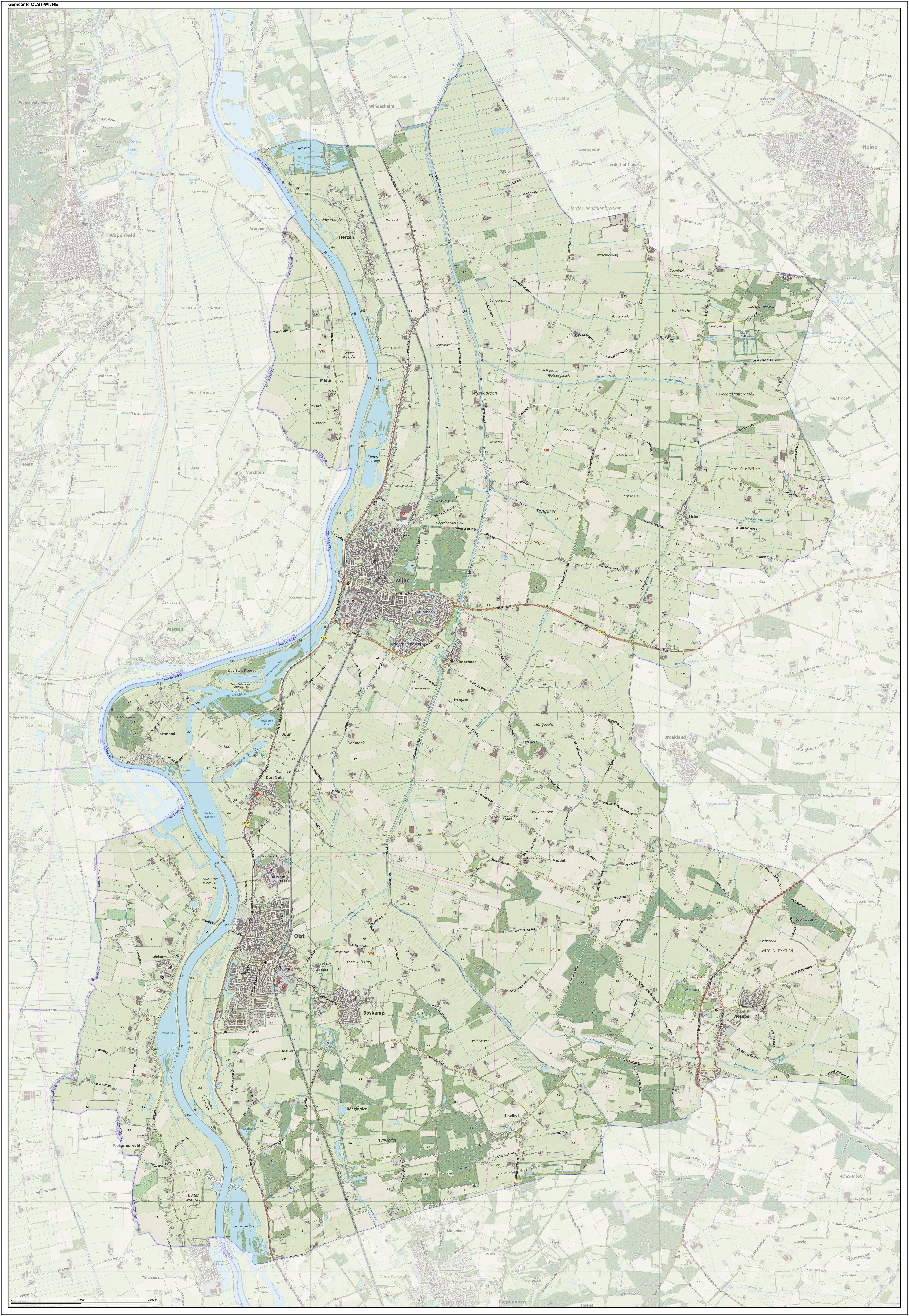 Topografische gemeentekaart. Resolutie: 400 pixels/km. Kaartbeeld samengesteld uit de open geodata van de Top10NL en Top25namen (Kadaster), Creative Commons-BY licentie. Gebouwvlakken uit open geodata BAG extract. Wegen uit de OpenStreetMap, OpenStreetMap community. Reliëfschaduw uit de Actuele Hoogtekaart AHN2. Samenstelling en kleurenschema: Jan-Willem van Aalst, met QGIS. Zie ook de Legenda.